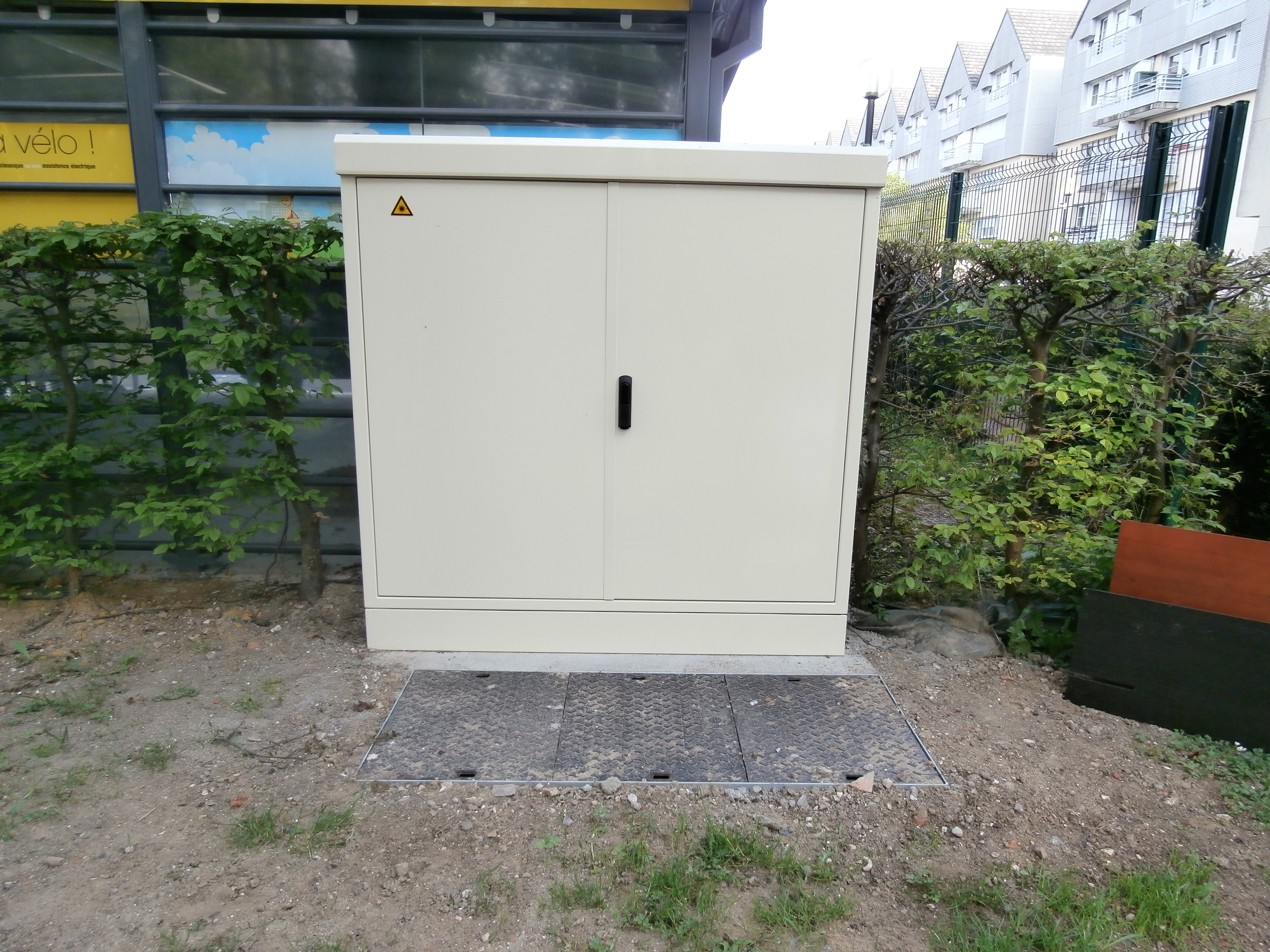 Point de Mutualisation de Zone déployé par SFR utilisé pour le réseau FTTH de Beauvais.